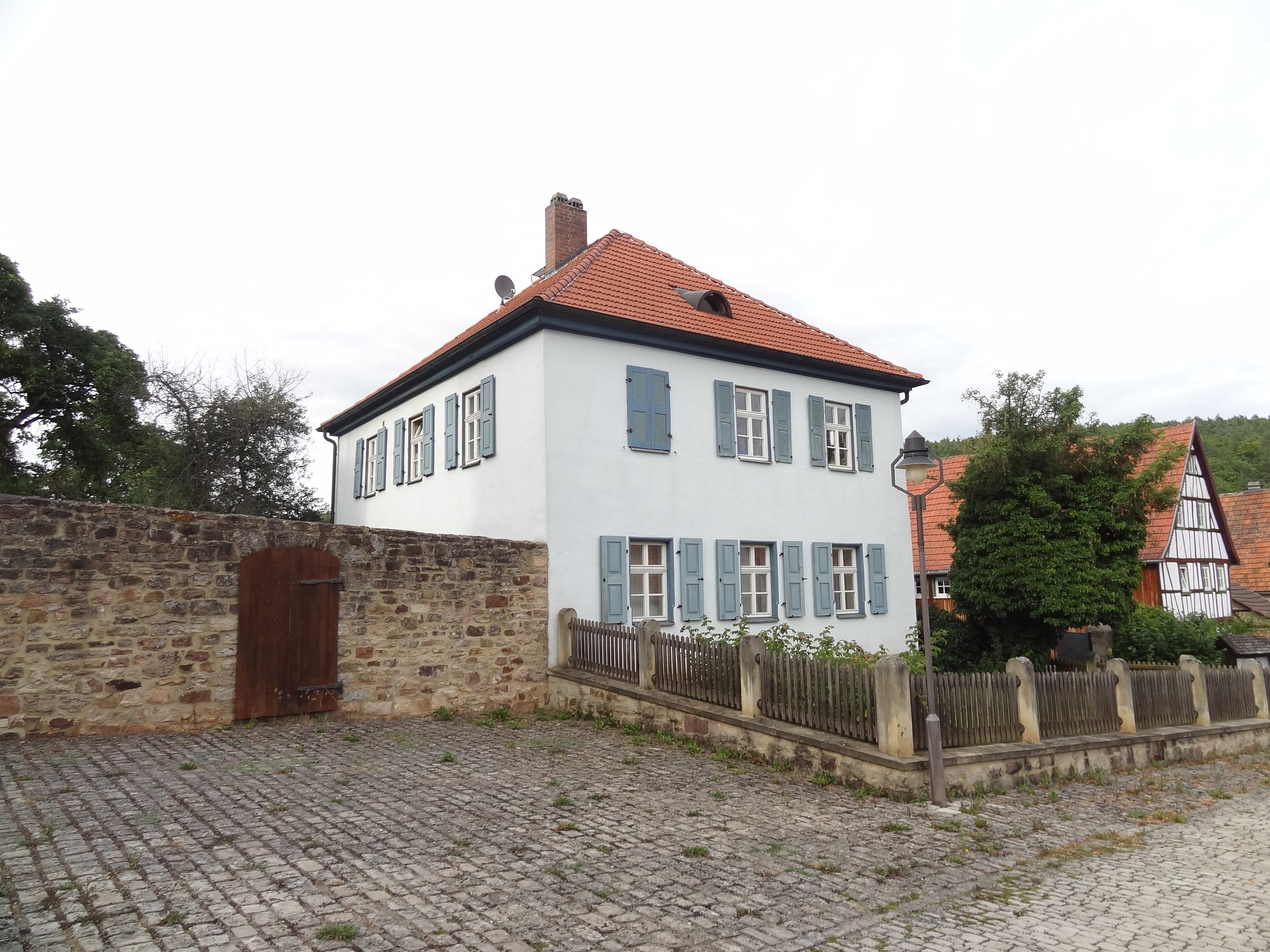 spätklassizistisches zweigeschossiges Walmdachhaus mit verputztem Fachwerkobergeschoss, Hofseite steinerne zweiläufige Freitreppe; Haustür mit Oberlicht, 1. Hälfte 19. JahrhundertThis is a photograph of an architectural monument.